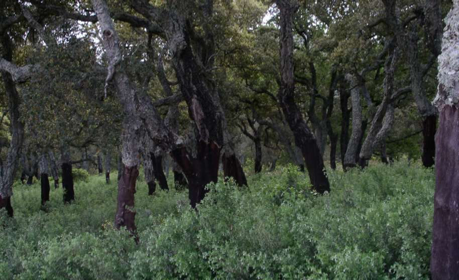 Chênaie dans le massif des Maures (Var, France) - Auteurs Jodelet / Lépinay